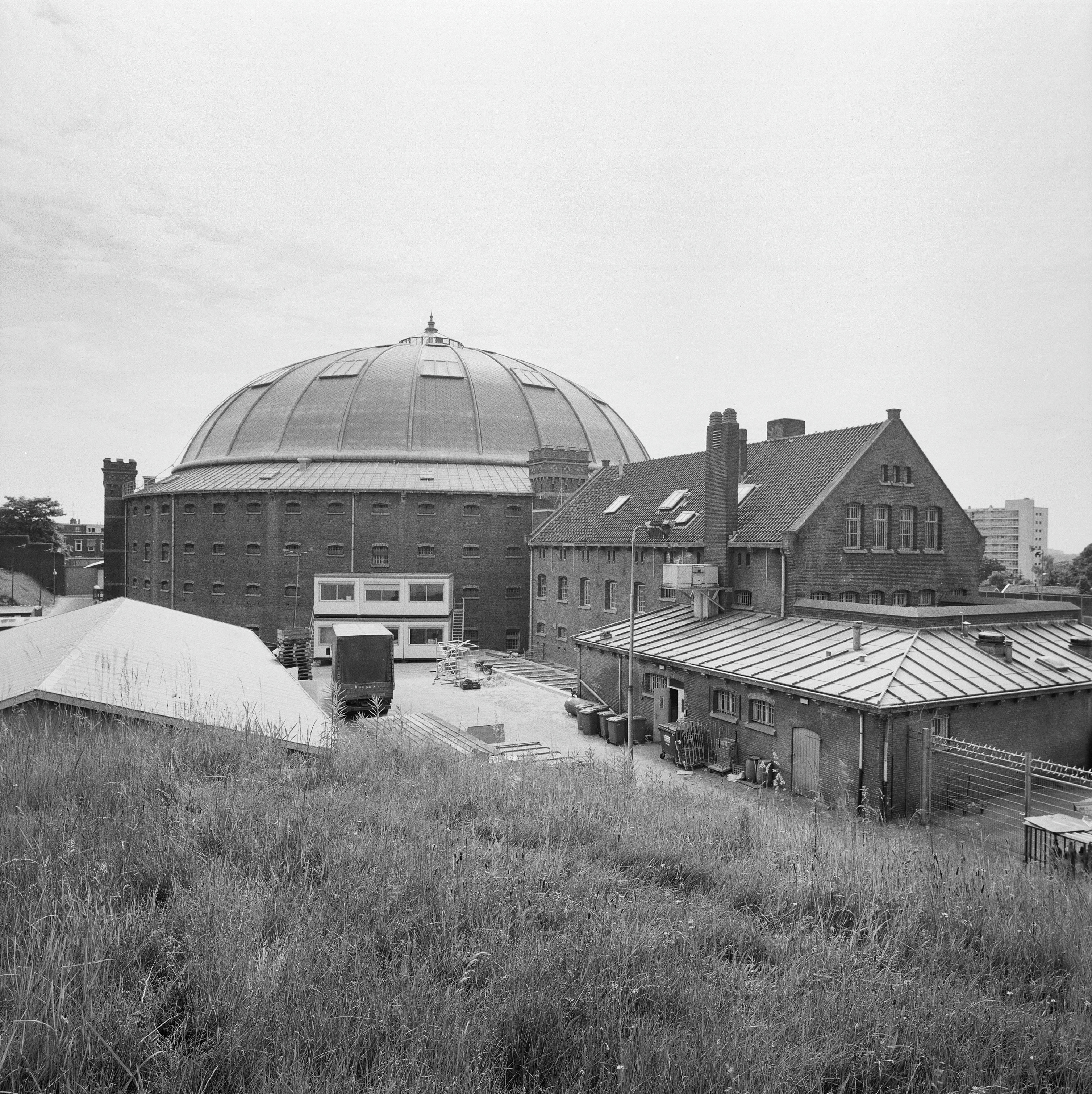 KOEPELGEVANGENIS: Exterieur OVERZICHT COMPLEX